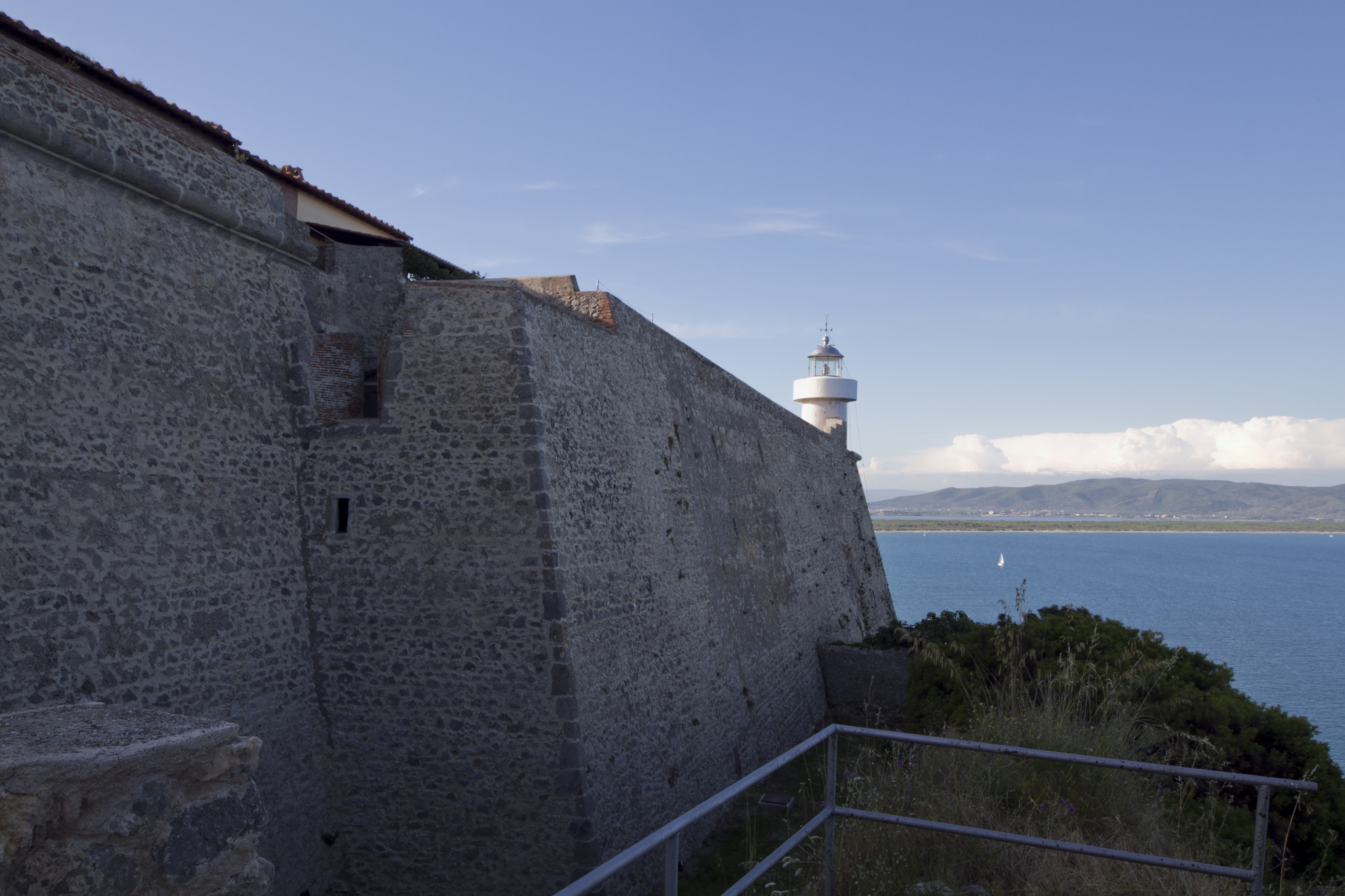 Rocca aldobrandesca, Porto Ercole, Grosseto, Tuscany, Italy